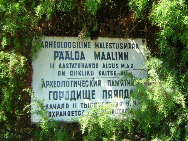 Päälda maalinna tähistav silt